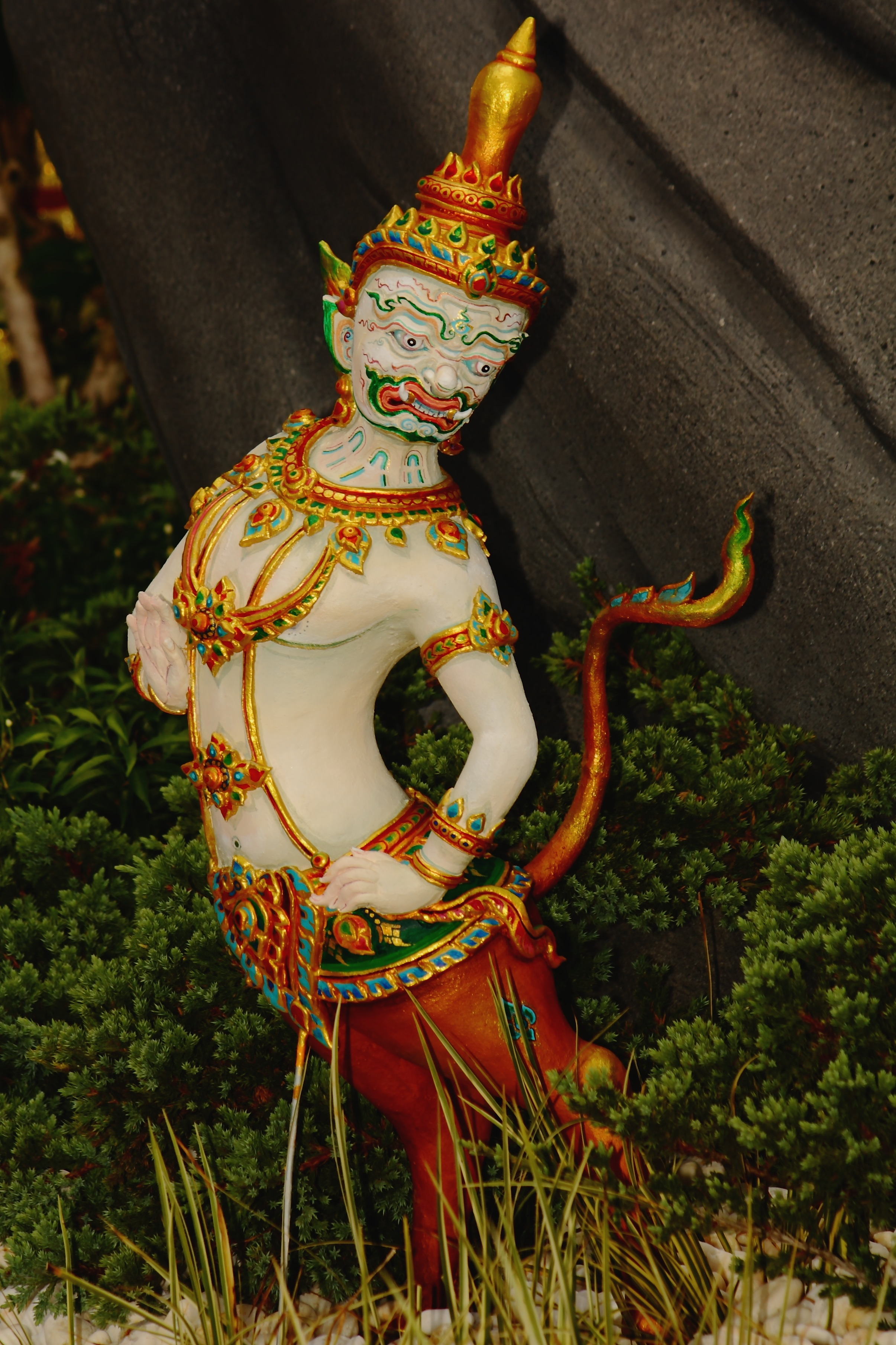 "มารีศ" ท่อนบนเป็นยักษ์ ท่อนล่างเป็นกวาง พระเมรุและเครื่องประกอบพระเมรุในพระราชพิธีพระราชทานเพลิงพระศพสมเด็จพระเจ้าภคินีเธอ เจ้าฟ้าเพชรรัตนราชสุดา สิริโสภาพัณณวดี ณ พระเมรุ ท้องสนามหลวง วันจันทร์ ที่ ๙ เมษายน พุทธศักราช ๒๕๕๕